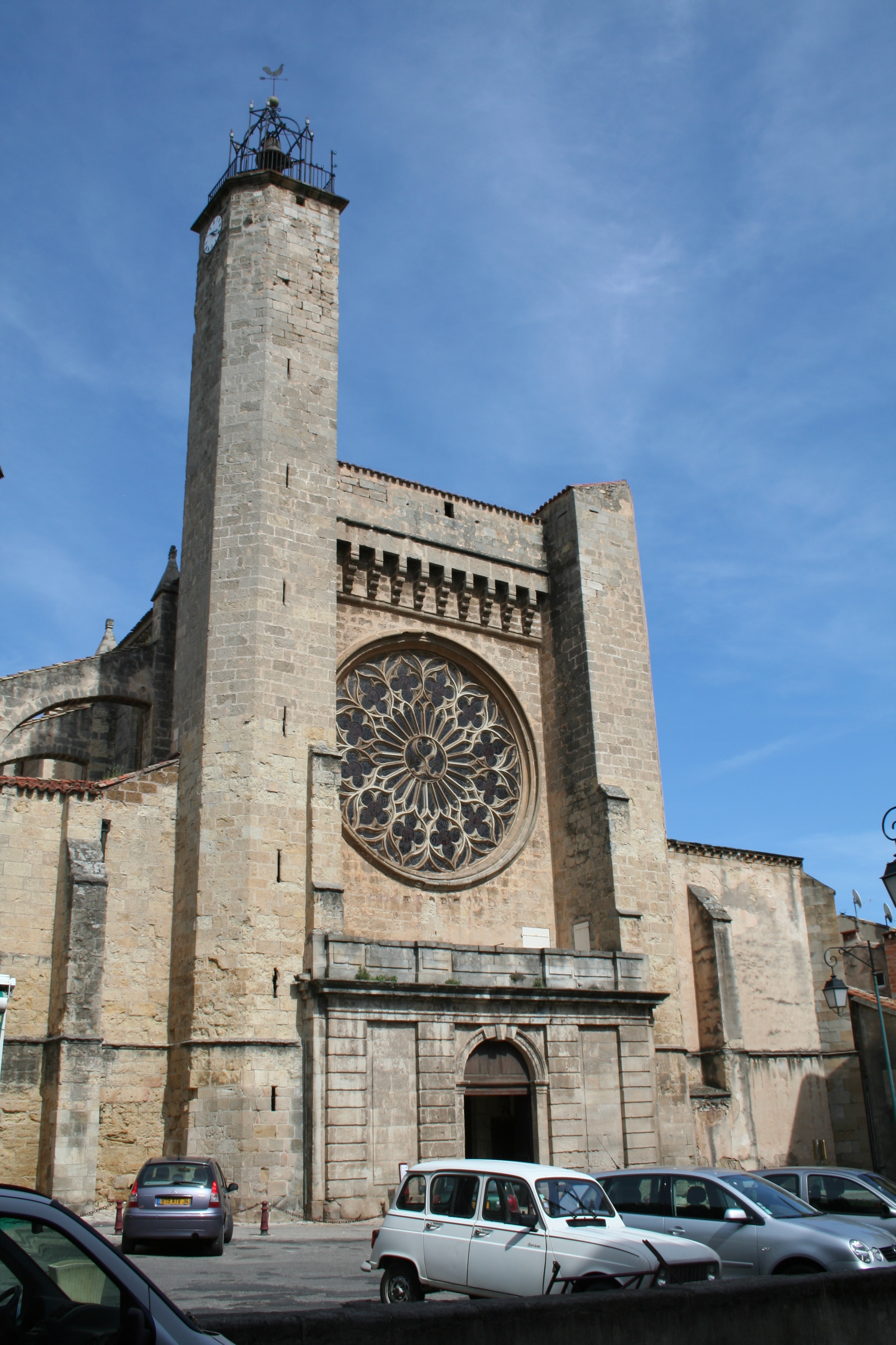 Clermont-l'Hérault (Hérault) - Collégiale Saint-Paul, façade occidentale.